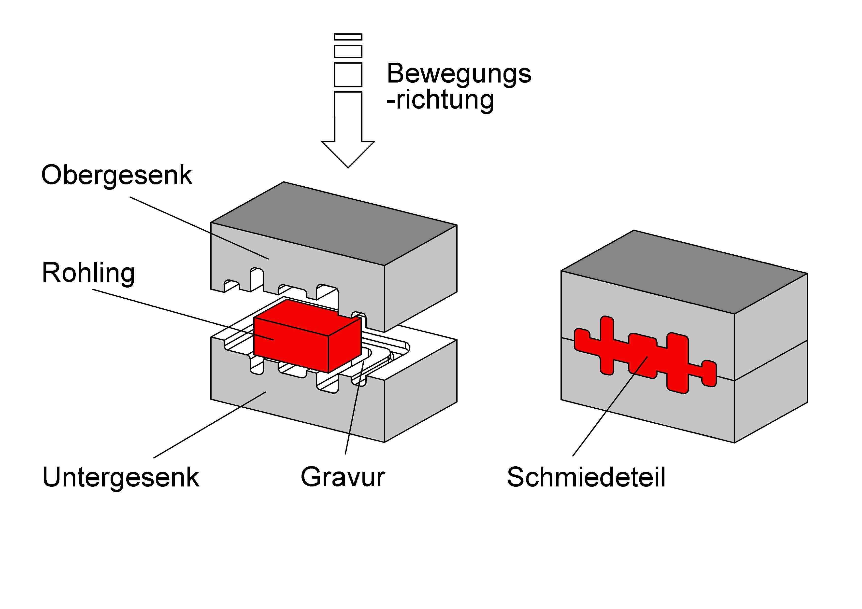 Schaubild Gesenkschmieden